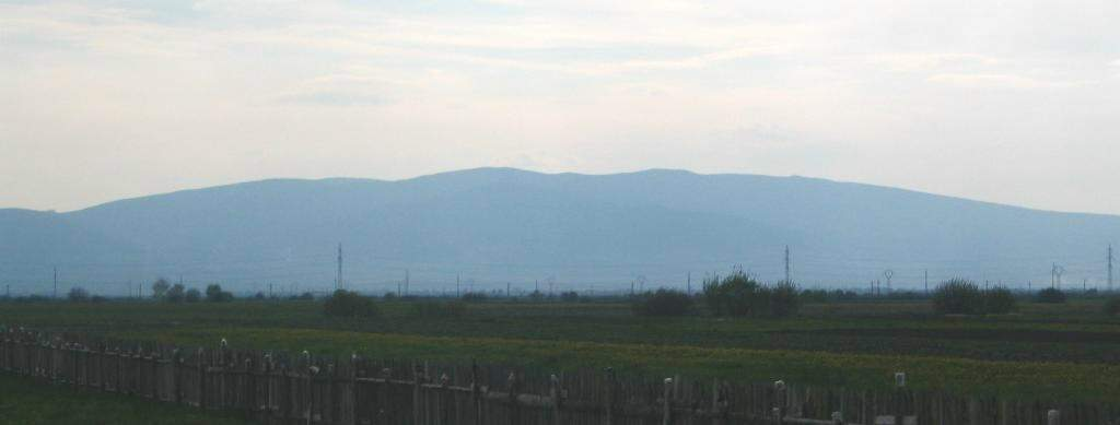 Mezőhavas, Görgényi-havasok, Erdély